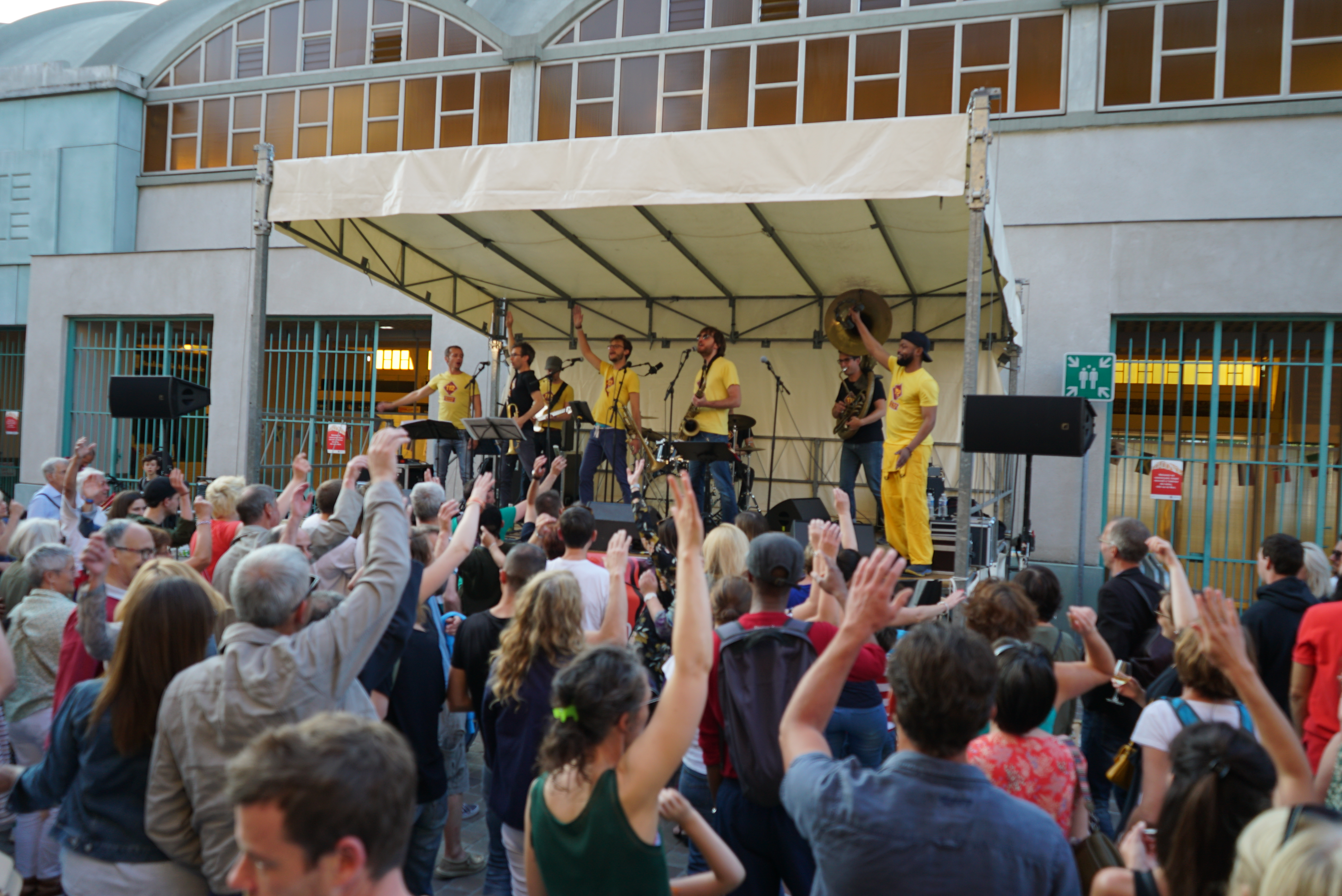 concert "place au jazz" dans le cadre d'un été à Reims.